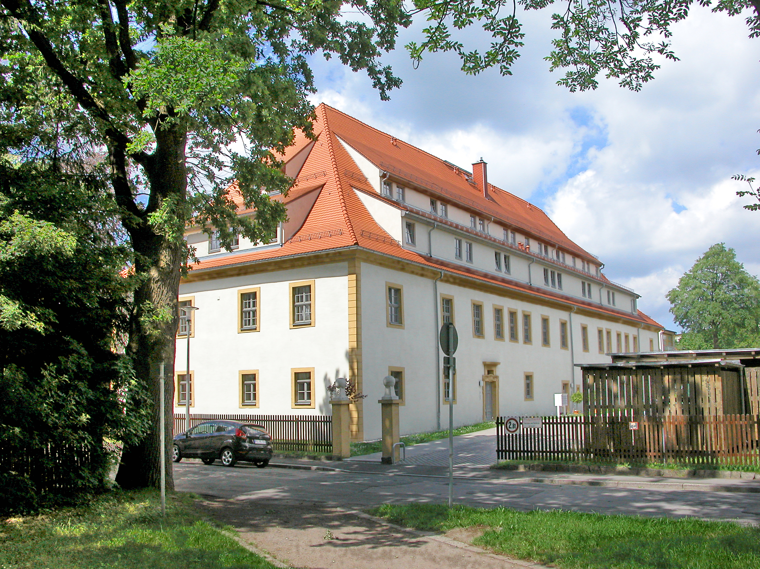 23.05.2009 09599 Freiberg, Bernhard-Kellermann-Straße 6 (GMP: 50.920824,13.333538): Herrenhaus Gottfriedsburg, später Friedeburg, 1704 für Gottfried Pabst von Ohain erbaut. Ohein war zusammen mit Böttger Miterfinder des sächsischen Porzellans. Das Haus wurde 2005 saniert und in Eigentumswohnungen aufgeteilt. Sicht von Südosten. [DSCN37682.TIF]20090523300DR.JPG(c)Blobelt